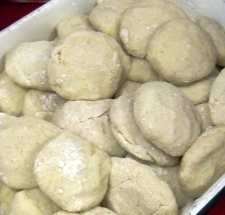 Chapaleles crudos, un plato típico de Chiloé (Chile) a base de papas y harina, ingrediente importante del curanto.